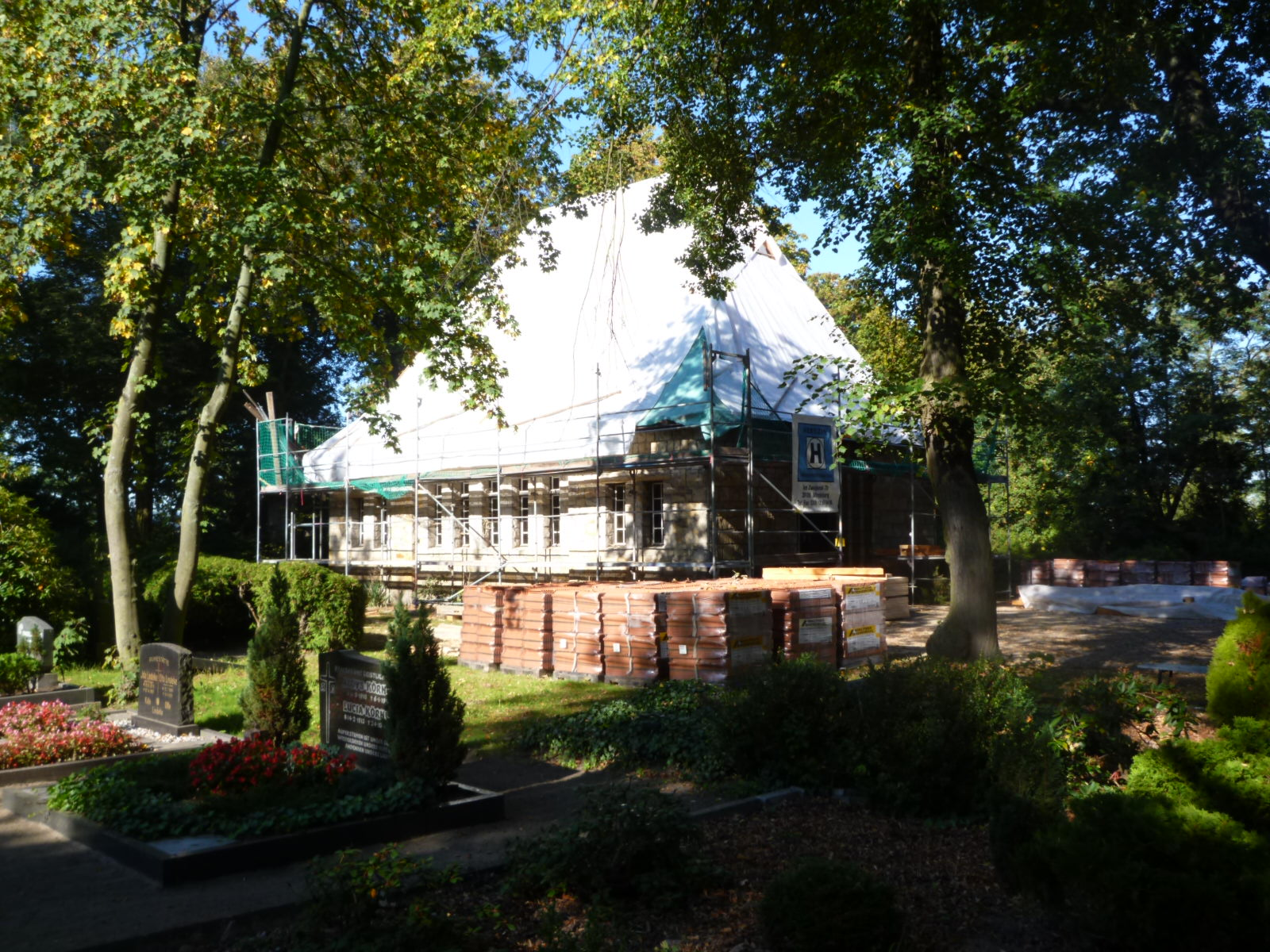 Calvörde, Friedhofskapelle, Bauarbeiten 2011, Bild 1 von 3